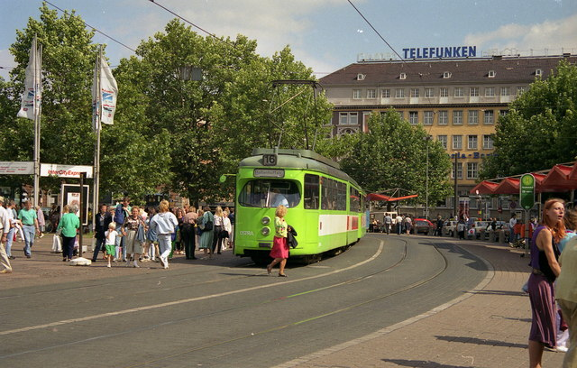 Tram outside Hannover Hbf